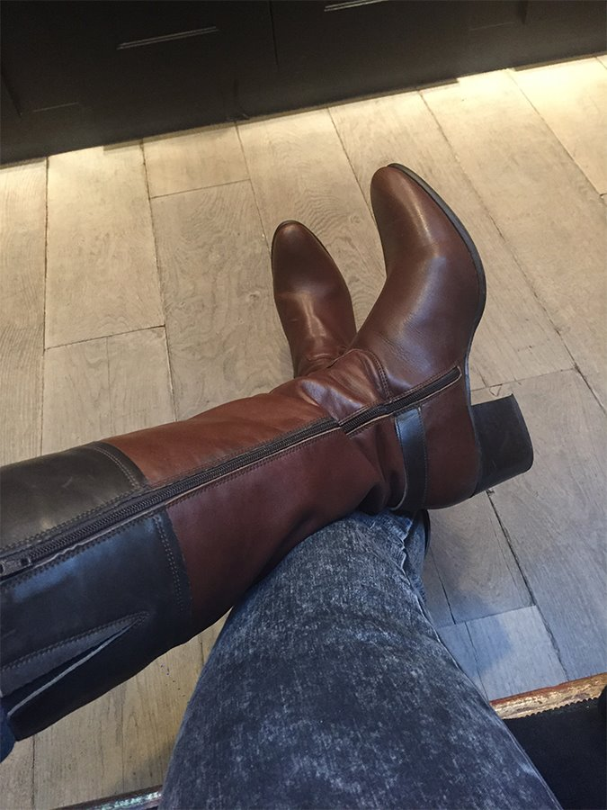 Bottes à talons hauts pour homme.